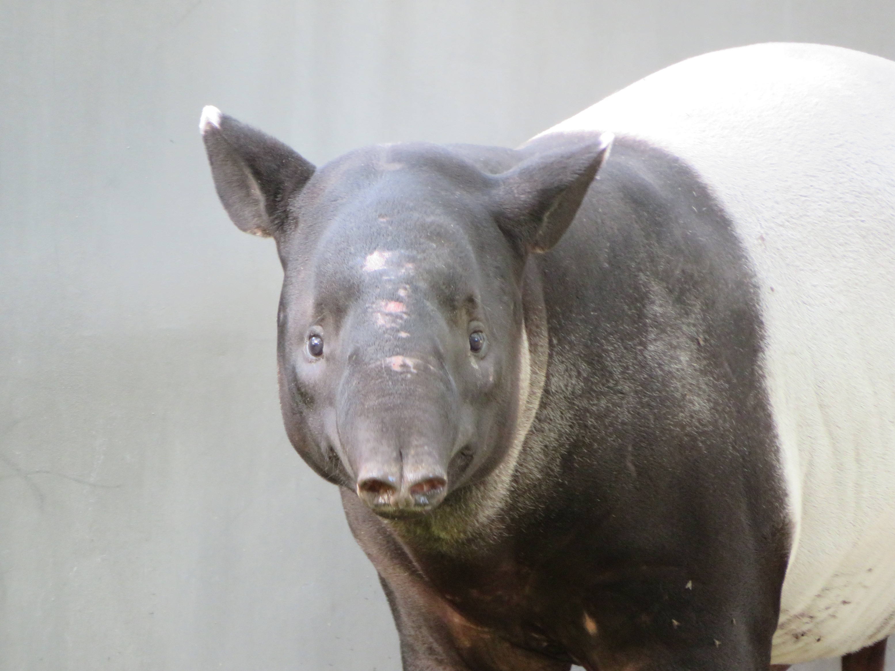 Ketiga, 18 Monate alt, aus Leipzig